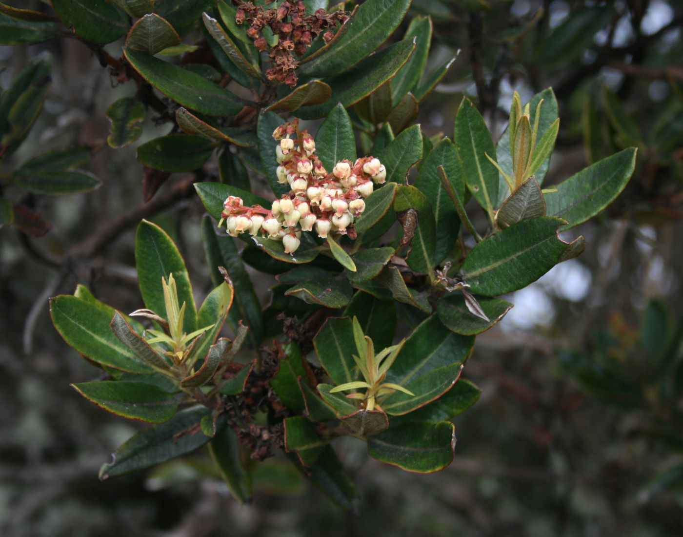 Comarostaphylis arbutoides, Heidekrautgewächse (Ericaceae) - Costa Rica: Prov. San José, Cordillera de Talamanca, Cerro Sákira E Carretera Interamericana, 3300-3350 m